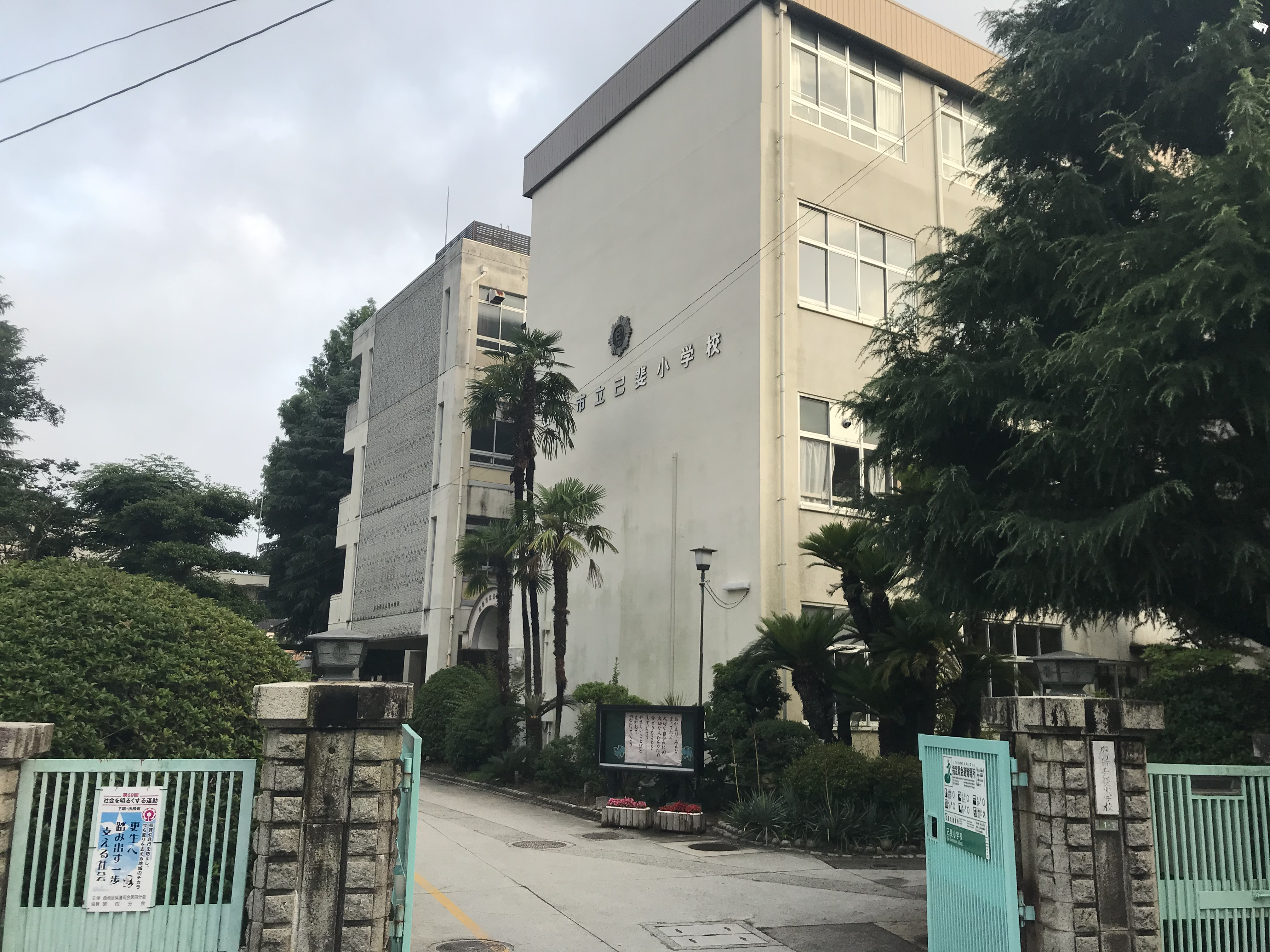 広島市立己斐小学校の外観 2020.7.4 撮影